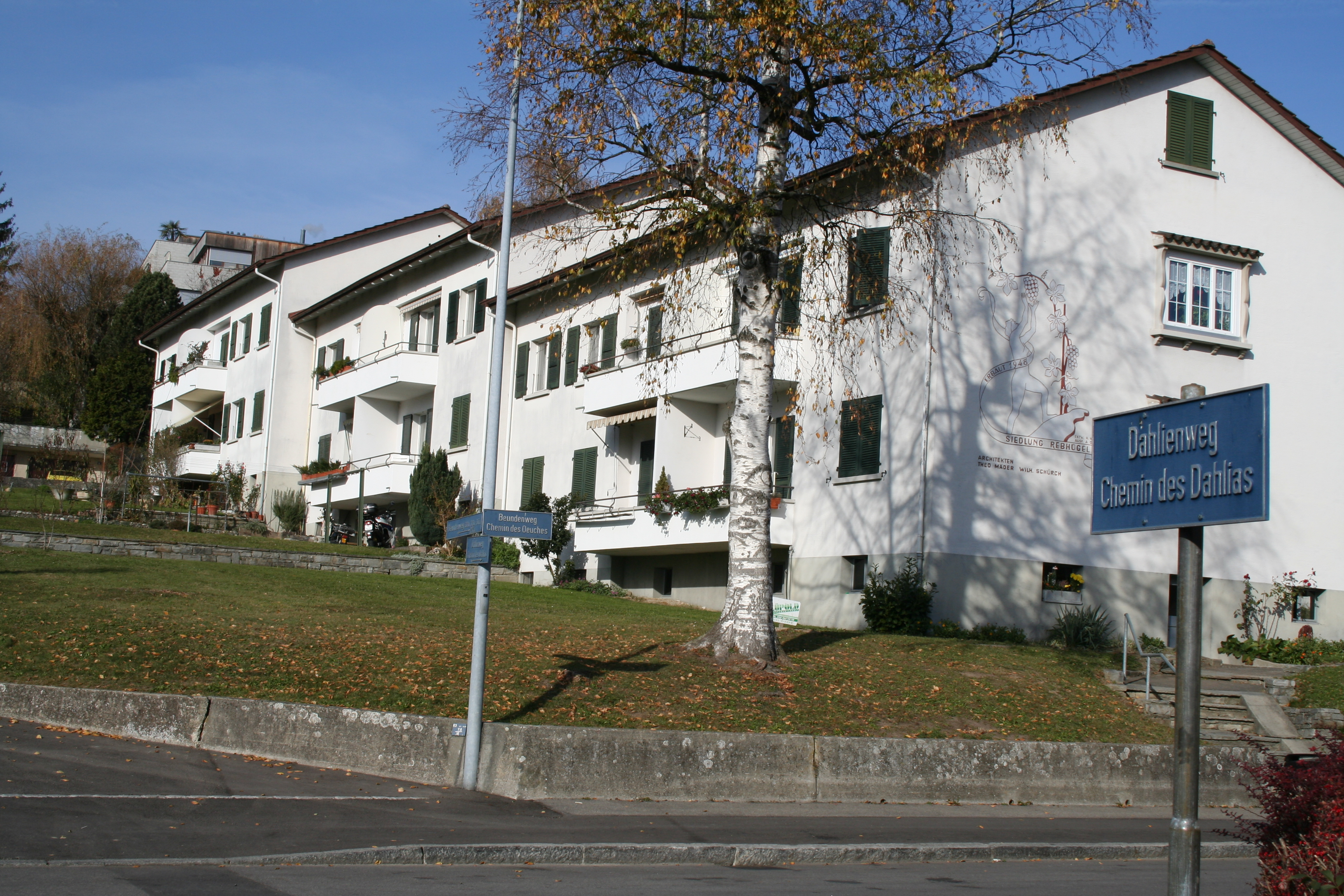 Mösliquartier2